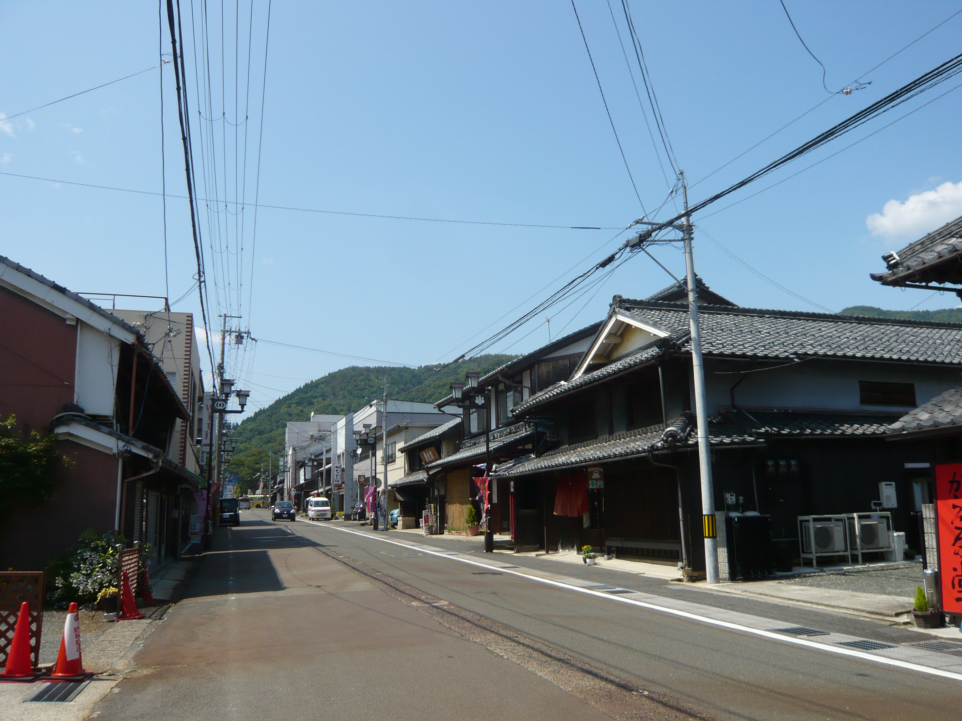 木之本の古い町並み